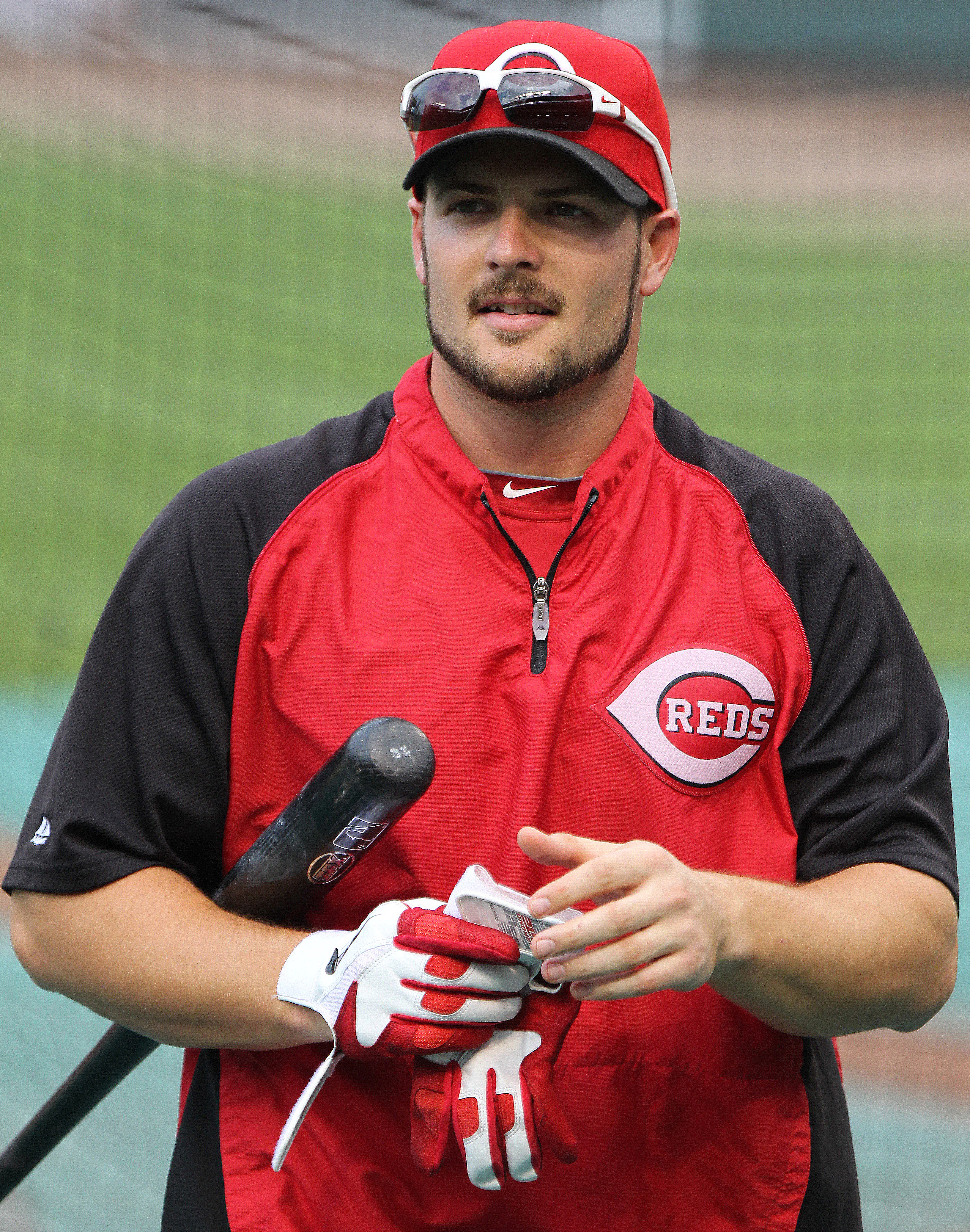 Chris Heisey